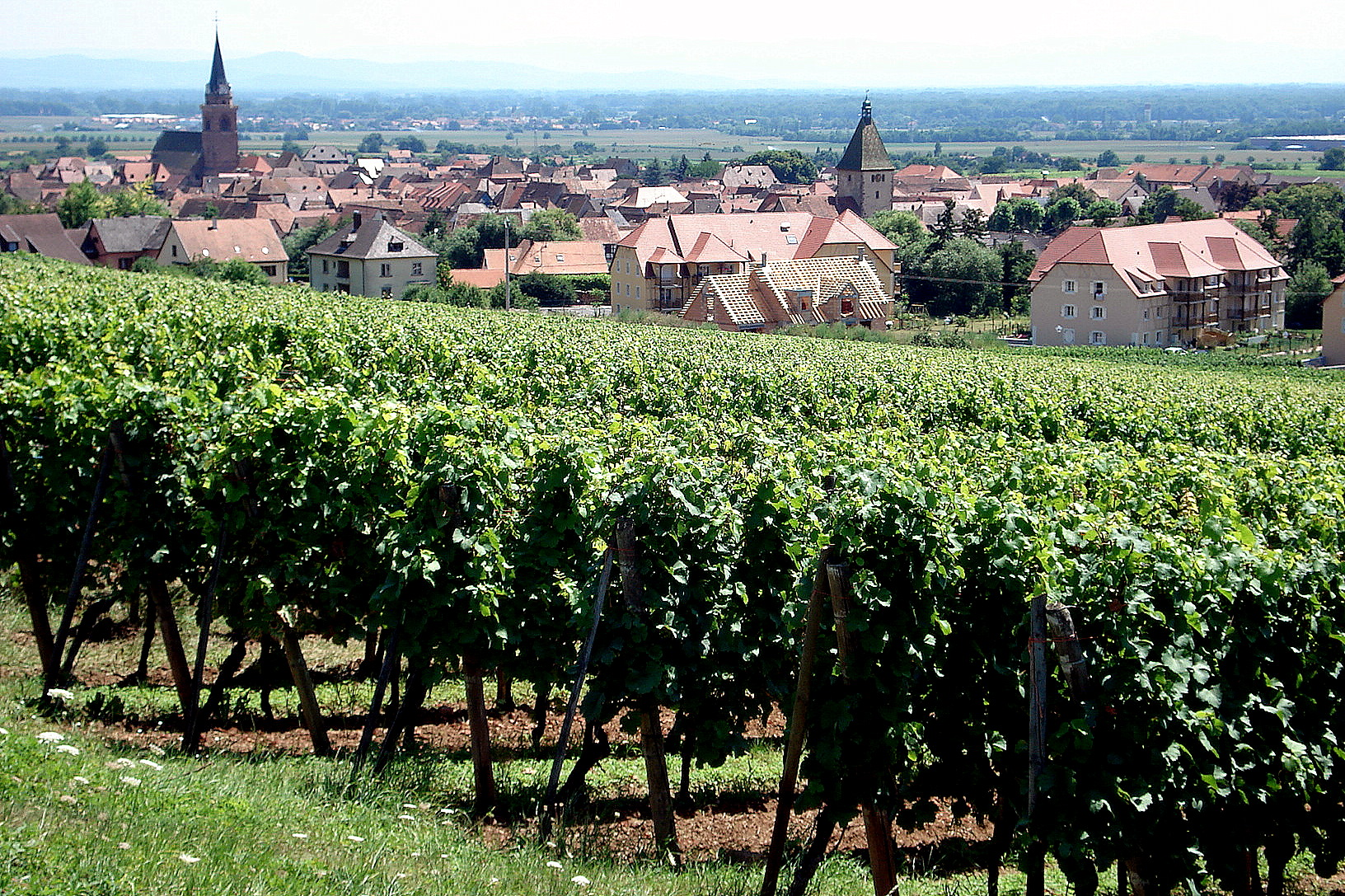 Bergheim, Haut-Rhin, France (Alsace). Vue depuis les flancs de l'Altenberg de Bergheim, au nord-ouest de la ville. À l'arrière-plan, la plaine d'Alsace. Dans le lointain à gauche se profilent les montagnes de la Forêt-Noire.